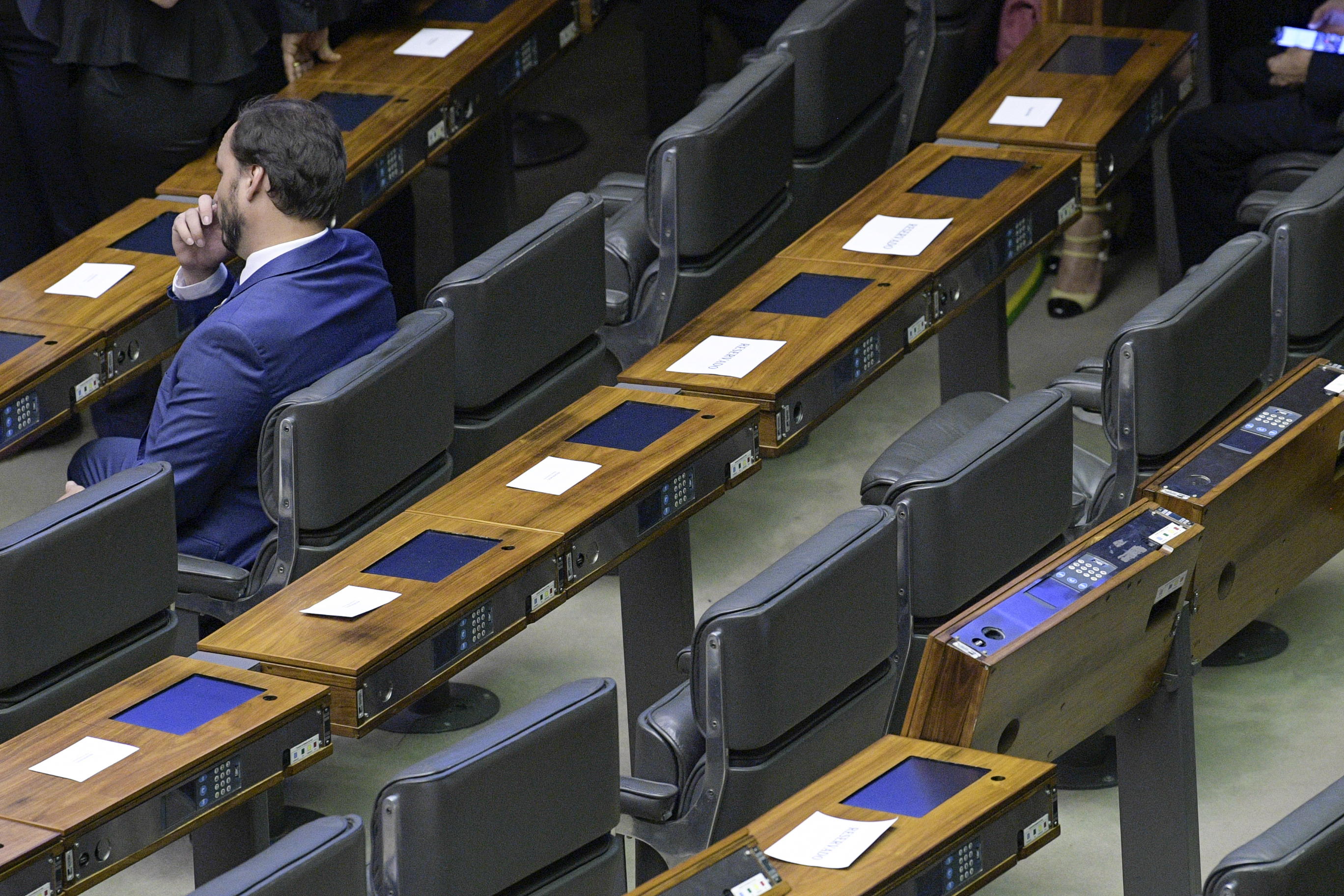 Plenário da Câmara dos Deputados durante sessão solene do Congresso Nacional destinada a dar posse ao presidente e ao vice-presidente da República. À bancada, Carlos Bolsonaro. Foto: Pedro França/Agência Senado